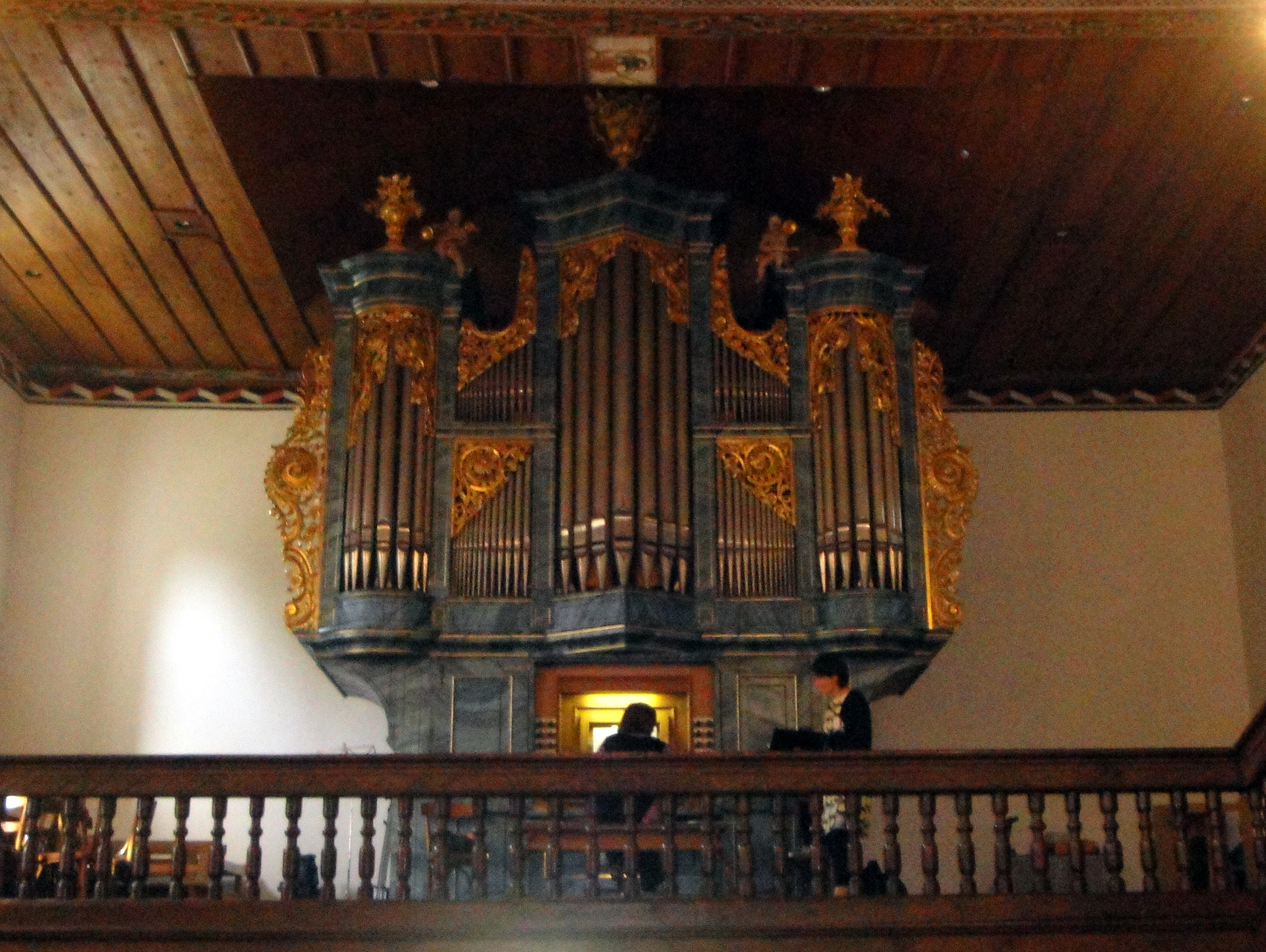 Köniz, Kirche der ehemaligen Komturei, Orgel